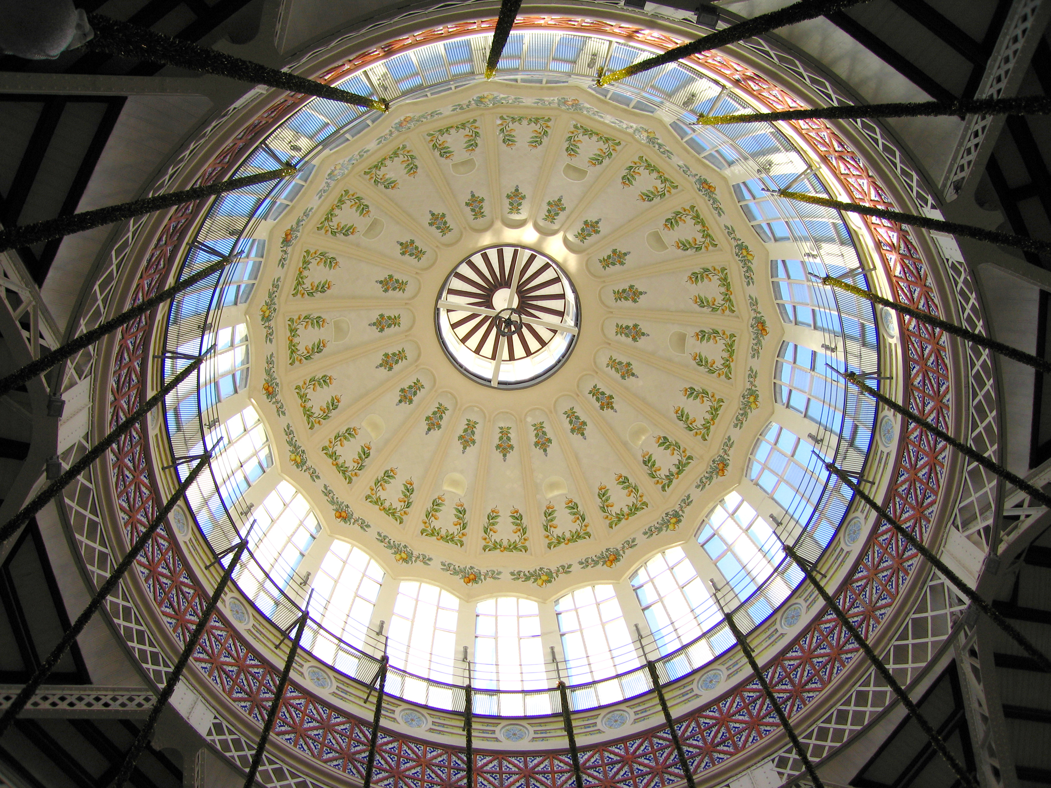 Interior de la Cúpula del Mercat central de València